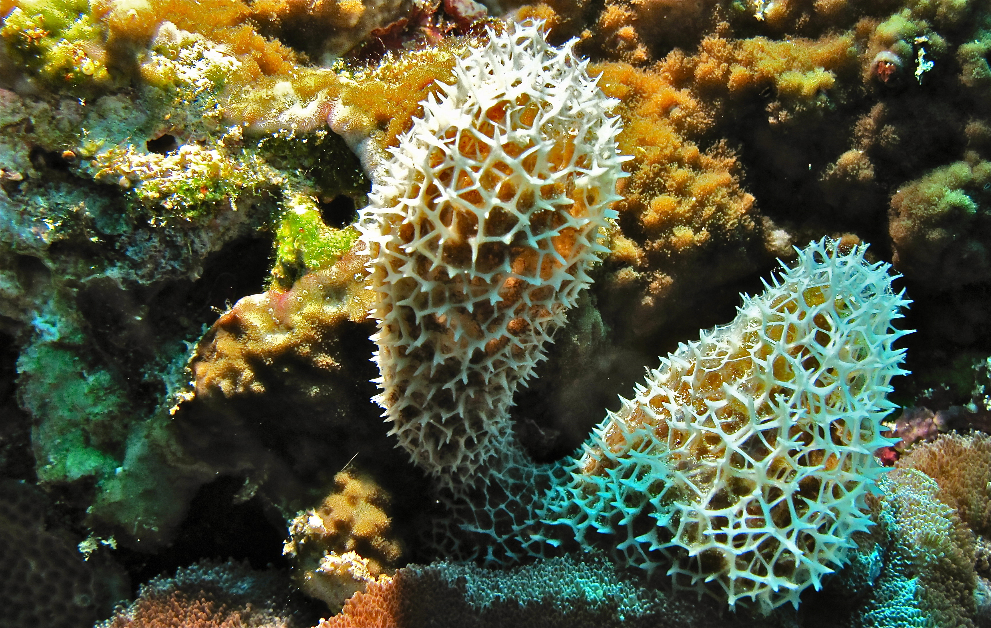 Mike's Point, Bunaken Island, Sulawesi, INDONESIA